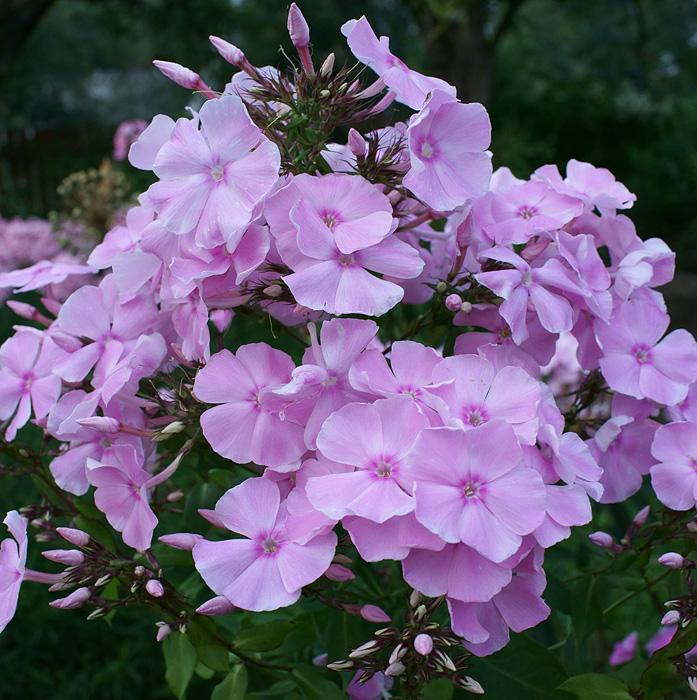 Флокс метельчатый 'Владимир'